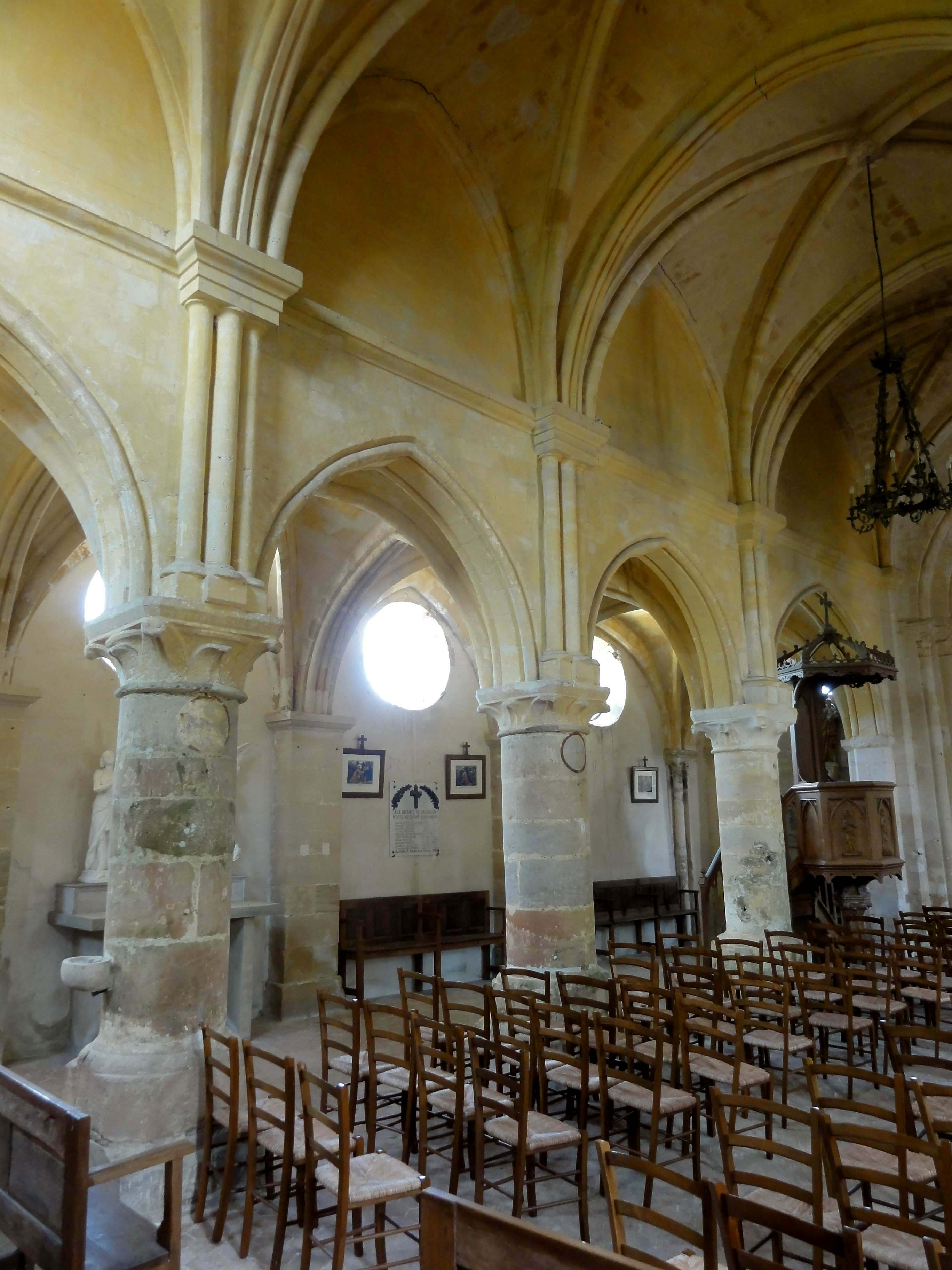 Intérieur de l'église (voir titre).